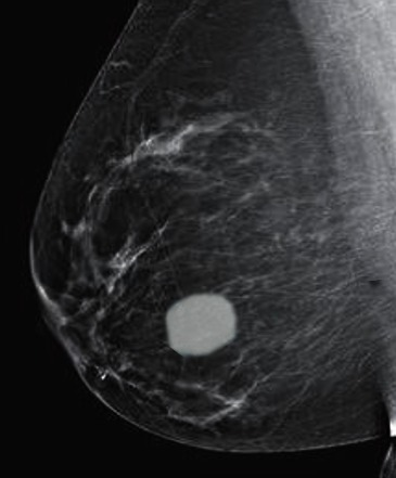 мамограма фіброаденоми